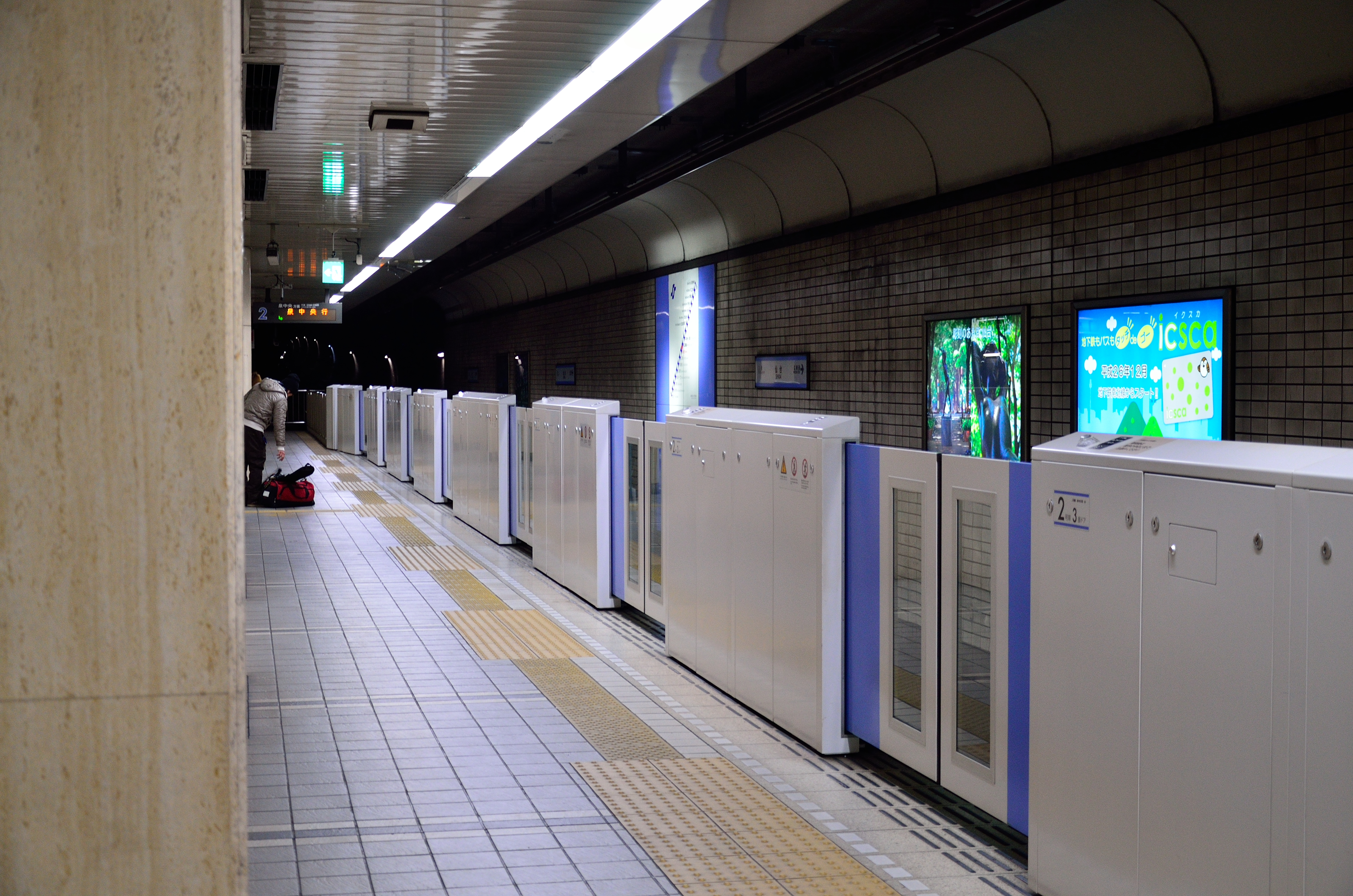 中文（台灣）: 仙台市地下鐵仙台駅月台